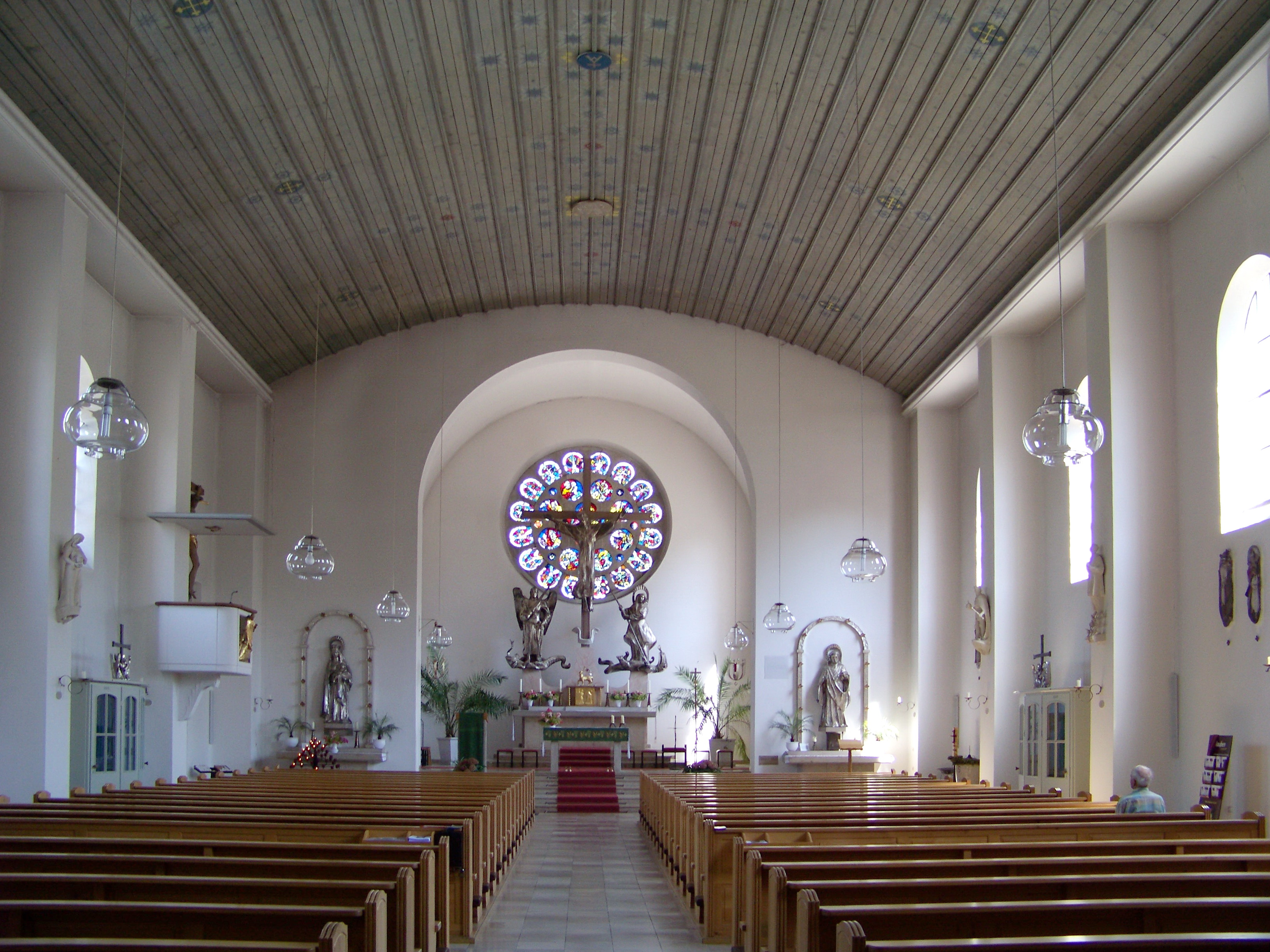 Mamming, Hauptstraße 26. Katholische Pfarrkirche St. Margareta. Die gotische Kirche aus dem 15. Jahrhundert wurde in den letzten Kriegstagen 1945 zerstört. Die heutige Kirche wurde 1947/49 nach Plänen von Friedrich Haindl, München neu erbaut. Das Kircheninnere ist ein sechsachsiger Wandpfeilersaal, der von einer Flachtonne aus Holz bedeckt wird.